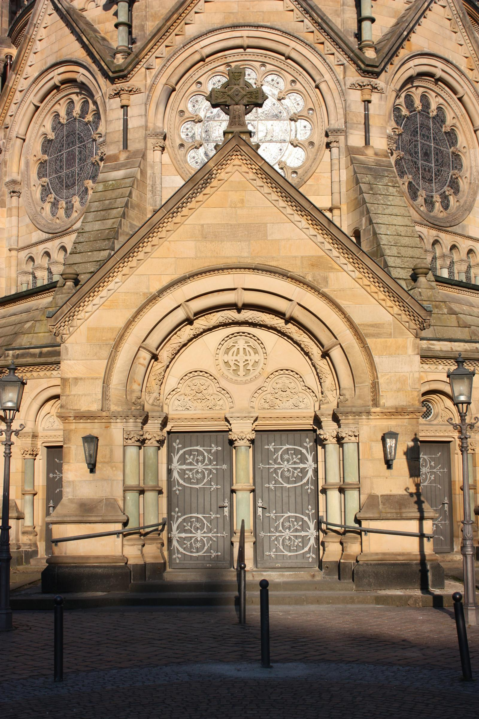 Portal zur Ringkirche Wiesbaden